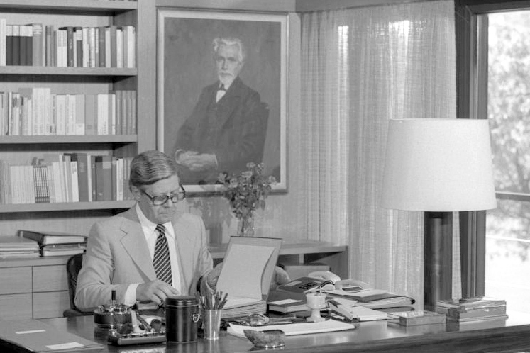 Bundeskanzler Schmidt in seinem Arbeitszimmer im neuen Bundeskanzleramt